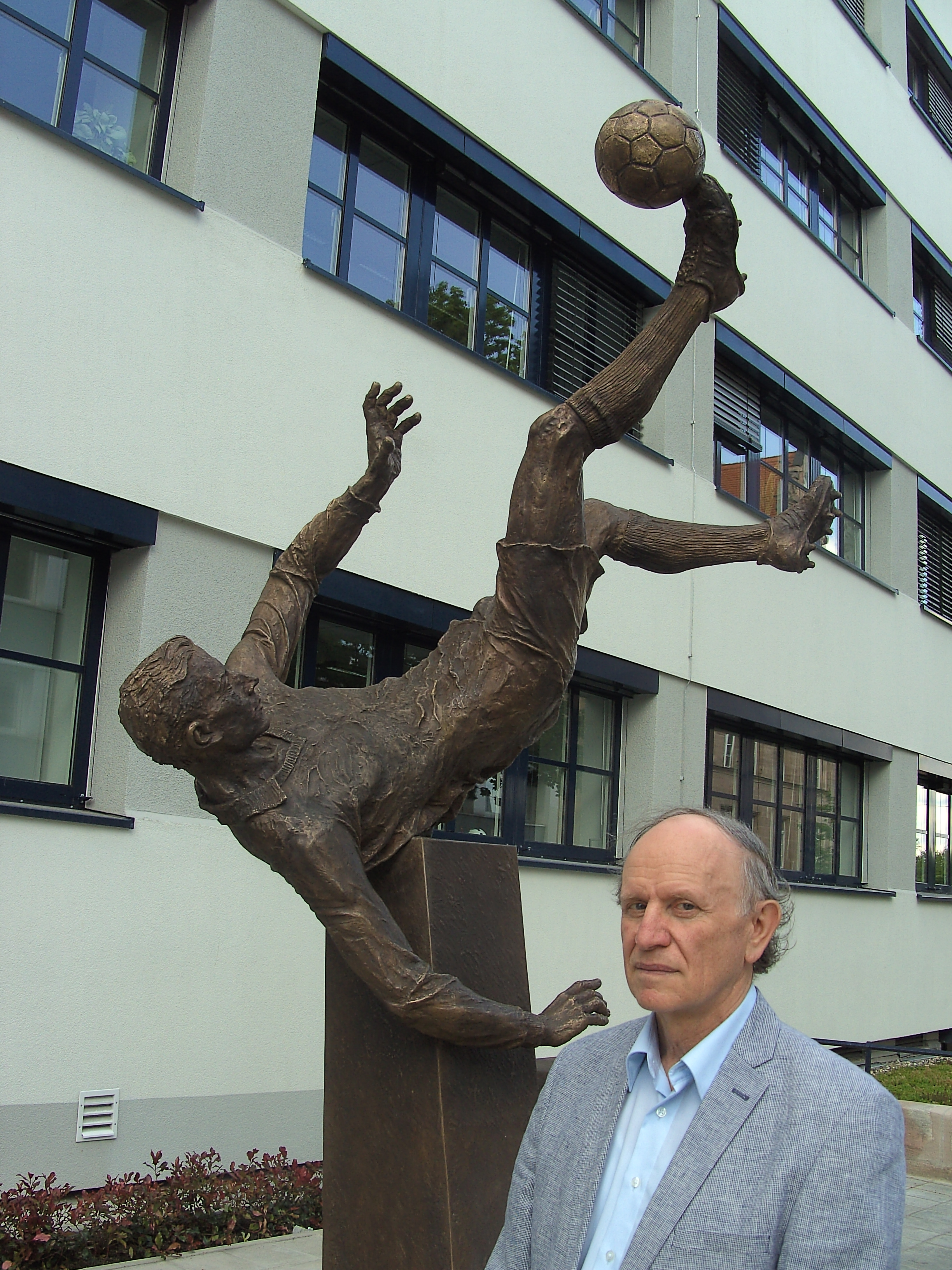 Kicker-Statue, Bildhauer Josef Tabachnyk, 2014 (Kicker-Sportmagazin in der Badstraße in Nurnberg)